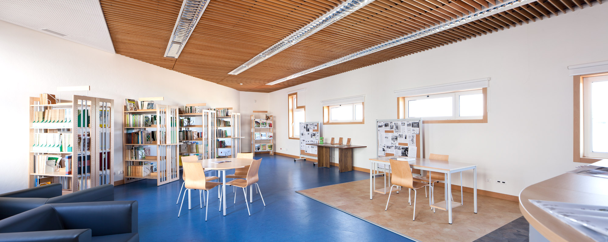 Centro de documentação com bibliografia ligada à temática